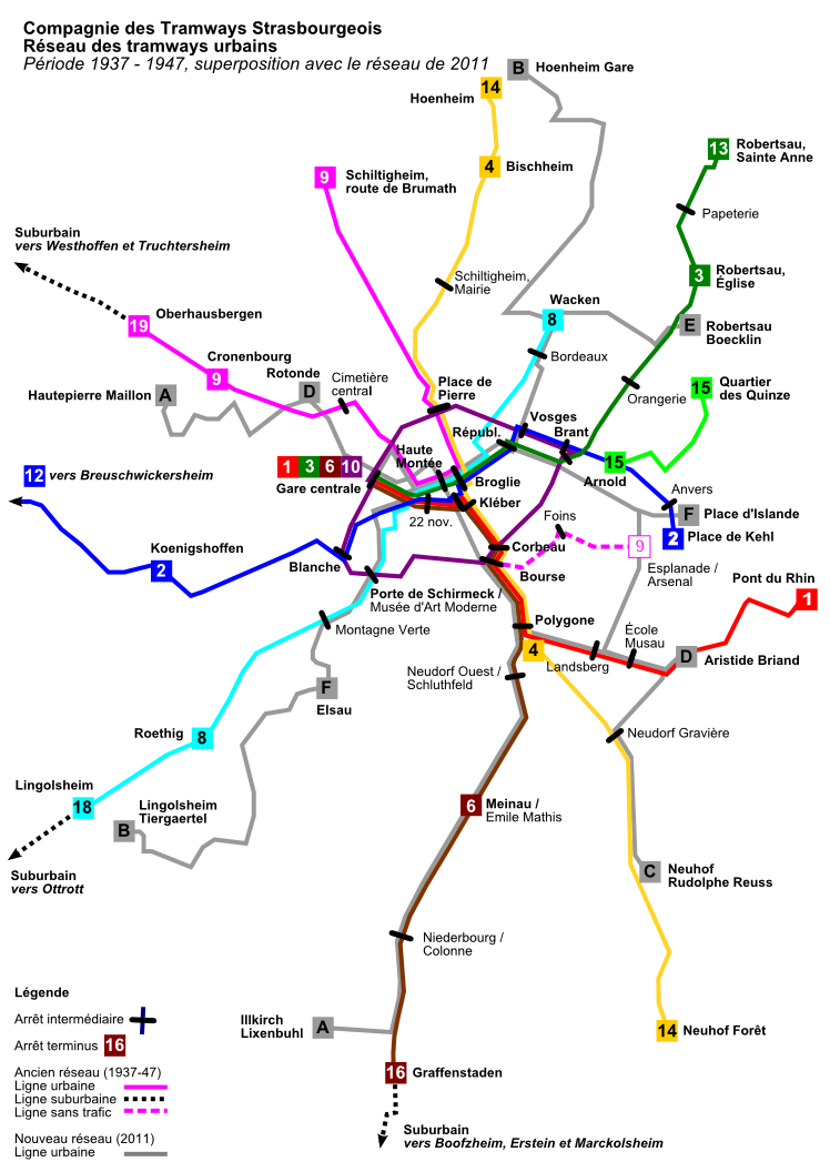 Réseau des tramways urbains de la CTS en 1937, après la réorganisation des lignes et la fermeture de la section Bourse - Arsenal / Esplanade de l'ancienne ligne 9. Cette carte est applicable pour la période jusqu'en 1947, quand les lignes 10 (moitié sud) et 15 sont remplacées par des trolleybus. La moitié nord de la ligne disparaît en 1950. Avec ces restrictions, la carte est applicable jusqu'au 15/12/1953, quand la ligne 3/13 est remplacée par une ligne d'autobus.